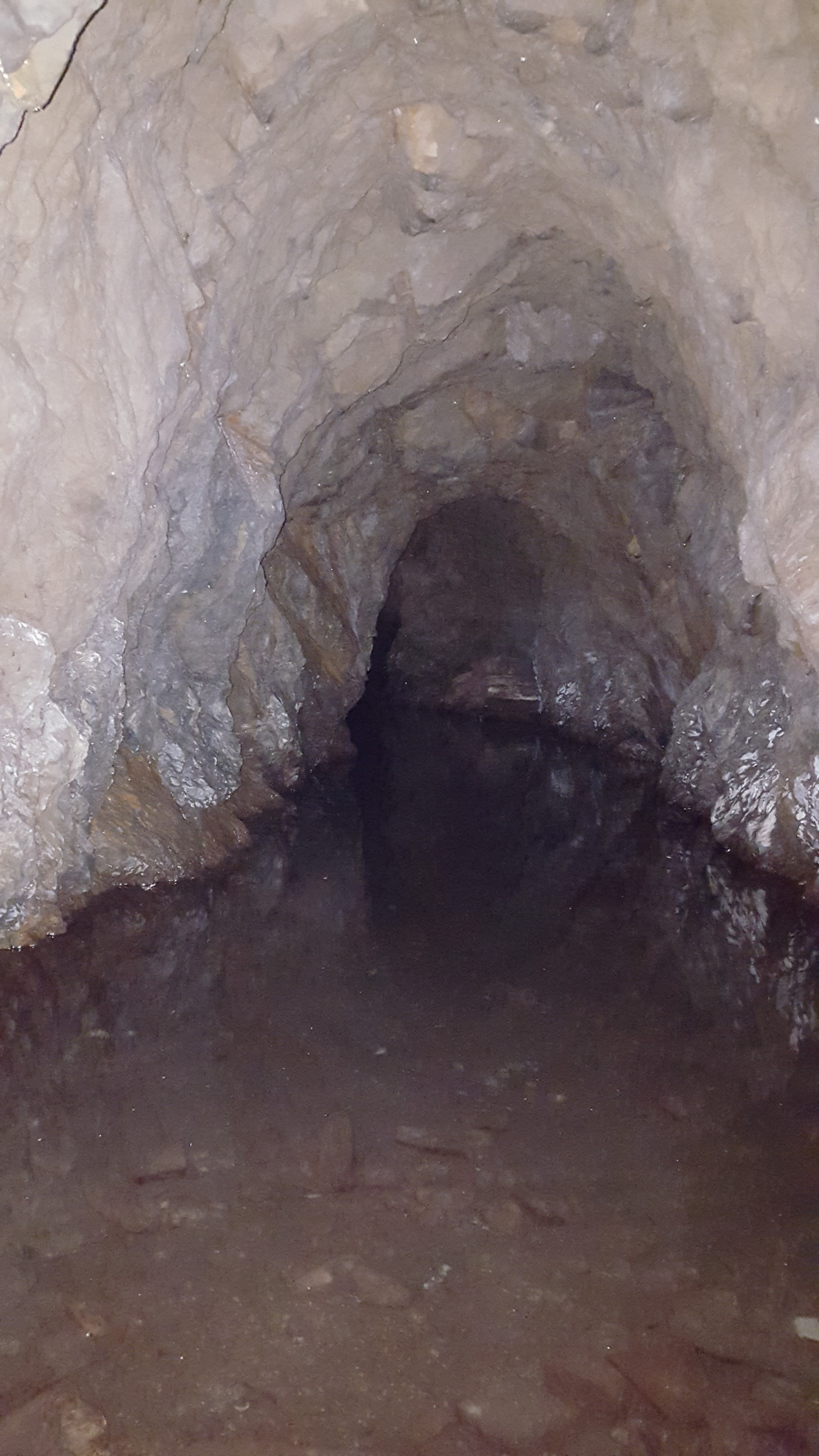 Blick in den oberen Stollen der Grube Sangberg bei Dillbrecht/Hessen